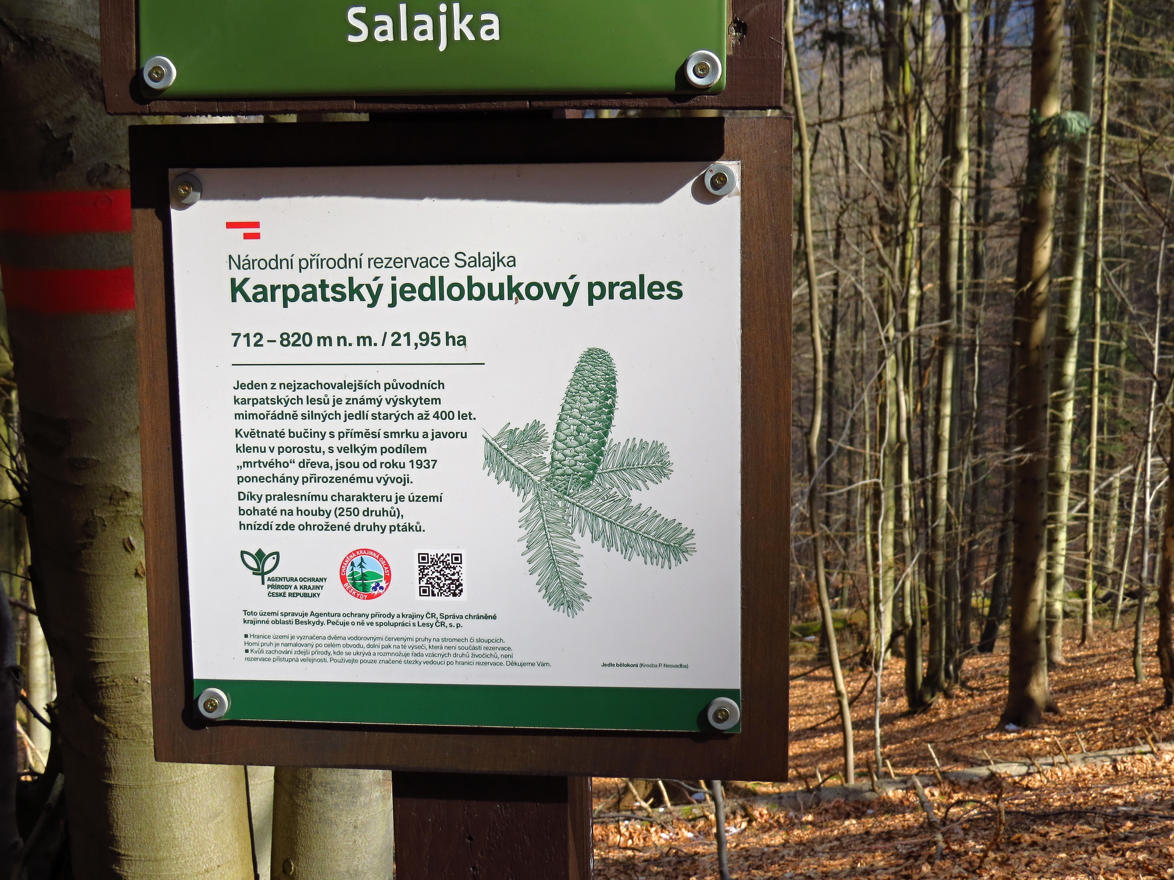 NPR Salajka